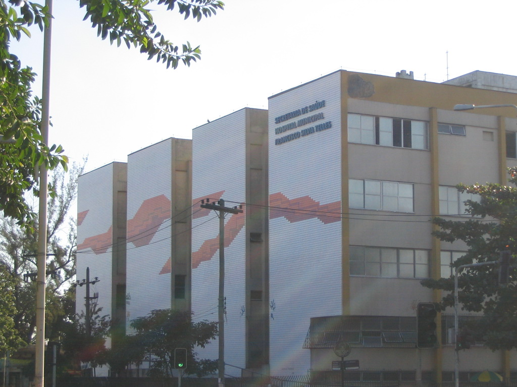 Hospital Municipal Francisco Silva Telles - PAM de Irajá Photographer: Nelson Cravo Junior